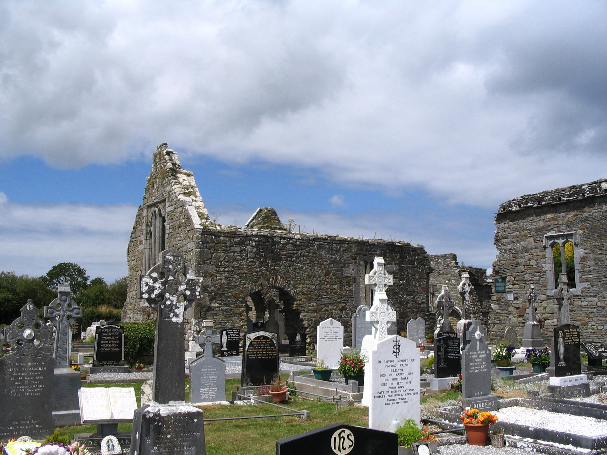 Ballylongford - Abbaye de Lislaugthin